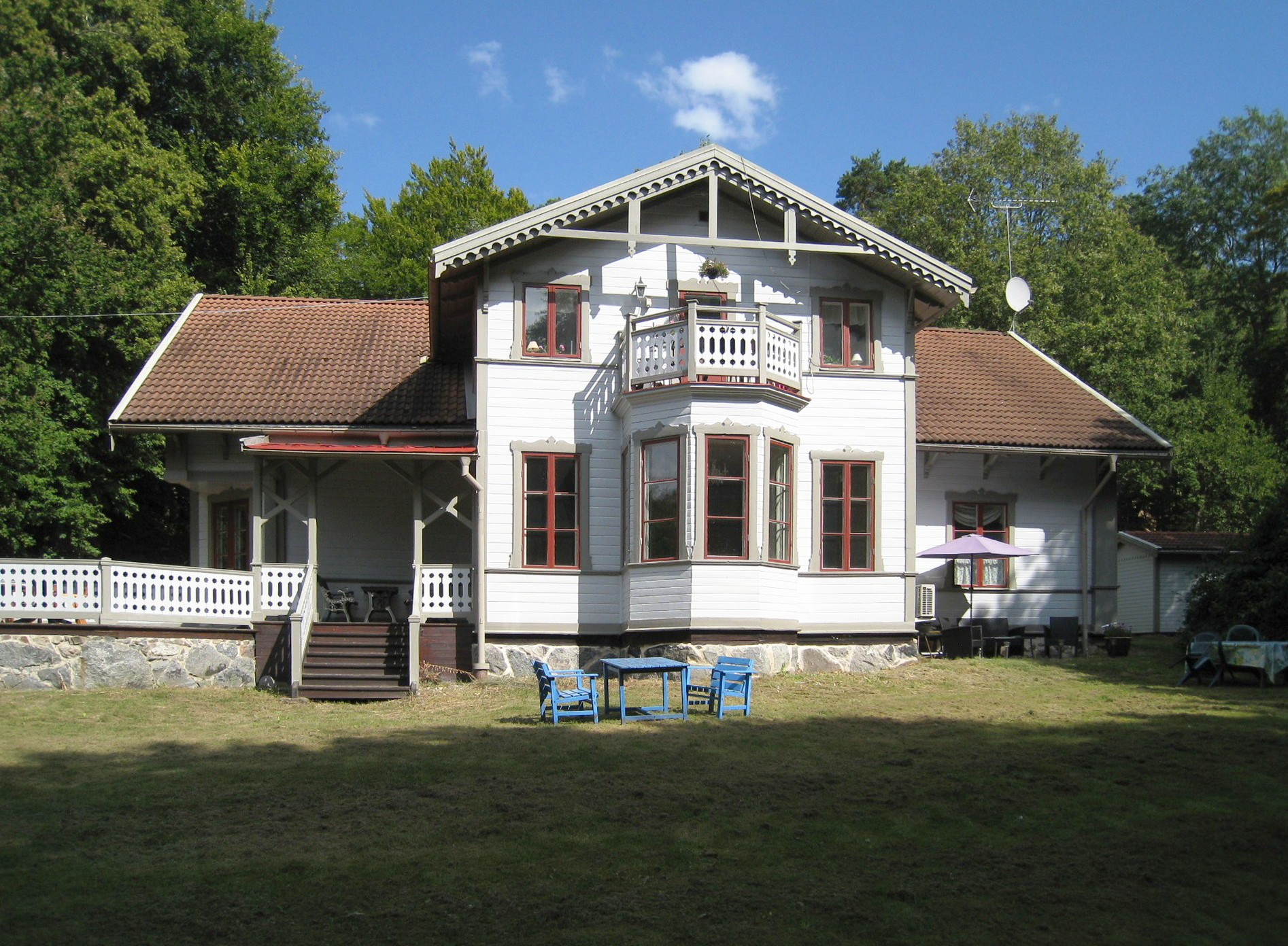 Sandviks gård i Görvälns naturreservat i Järfälla kommun, Stockholms län. Huvudbyggnaden från söder.